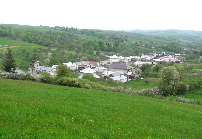 Celkový pohľad